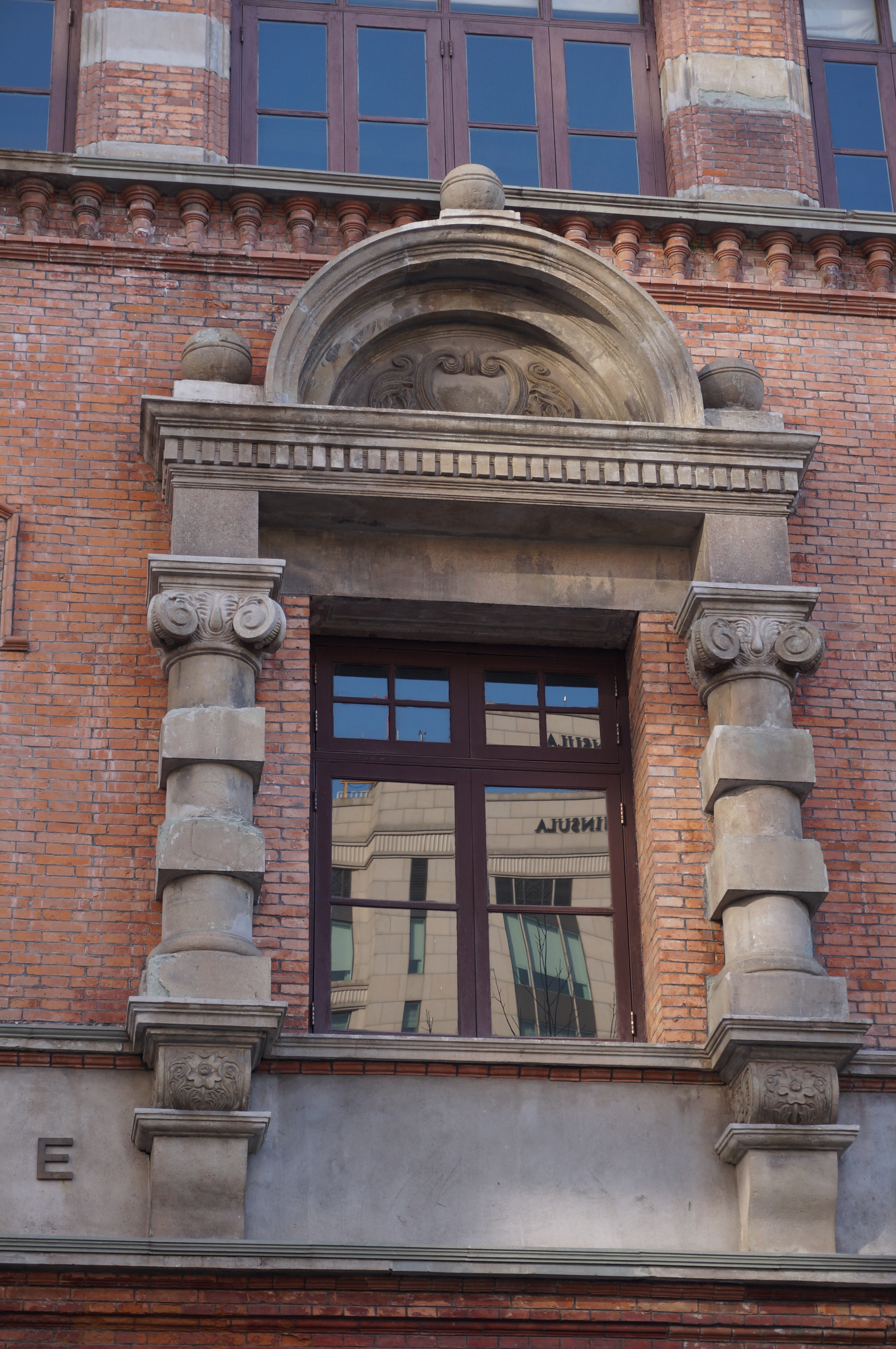 上海安培洋行大楼装饰